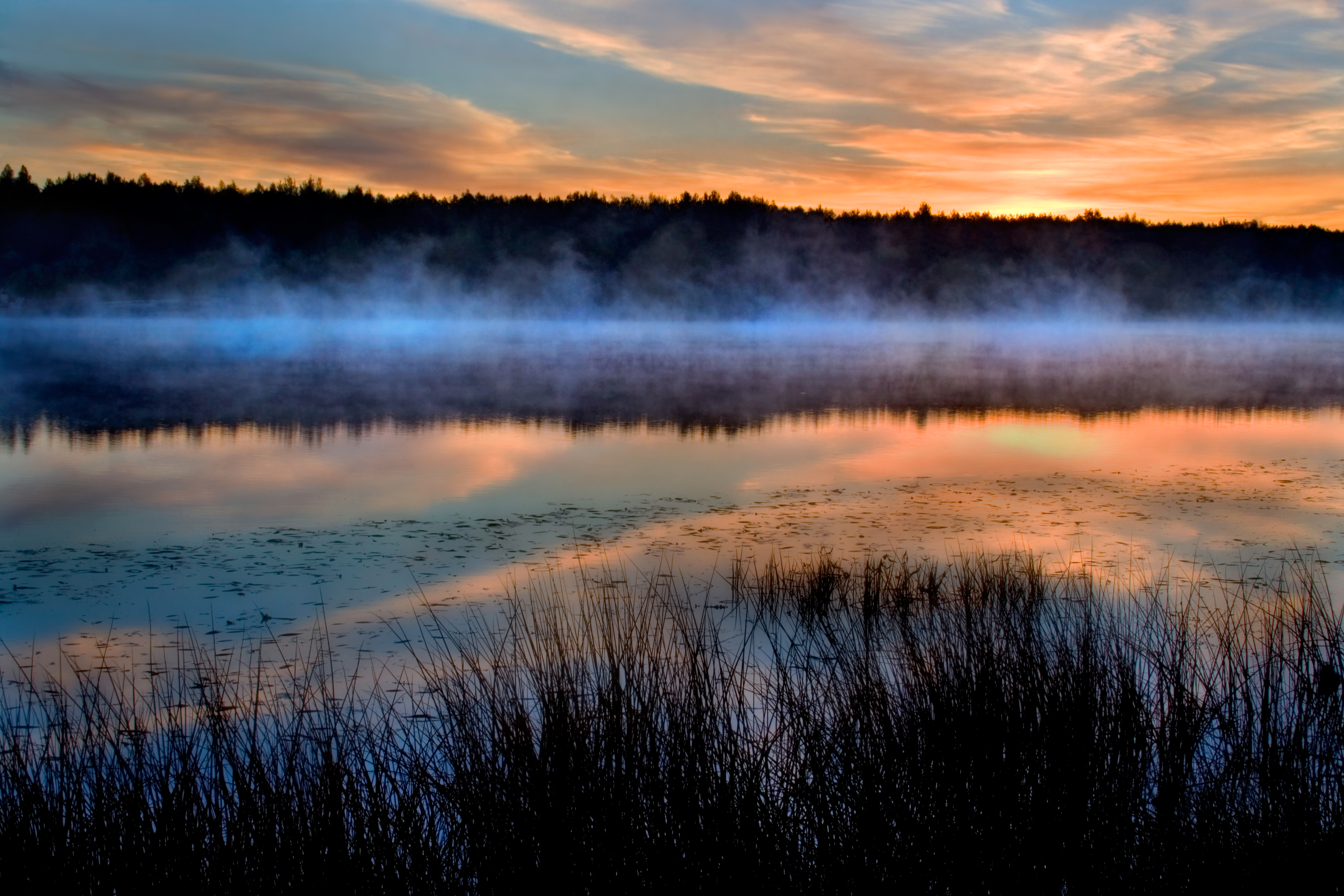 Hommikune Narva jõgi